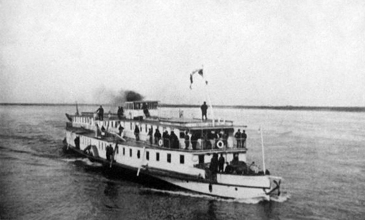 Пароход «Кормилецъ». Пароходство Е. И. Мельниковой, 1912 год.